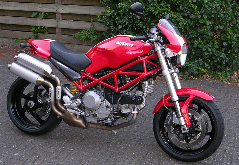 Ducati Monster S2R 1000 uit 2006 (zwarte wielen zijn niet origineel)